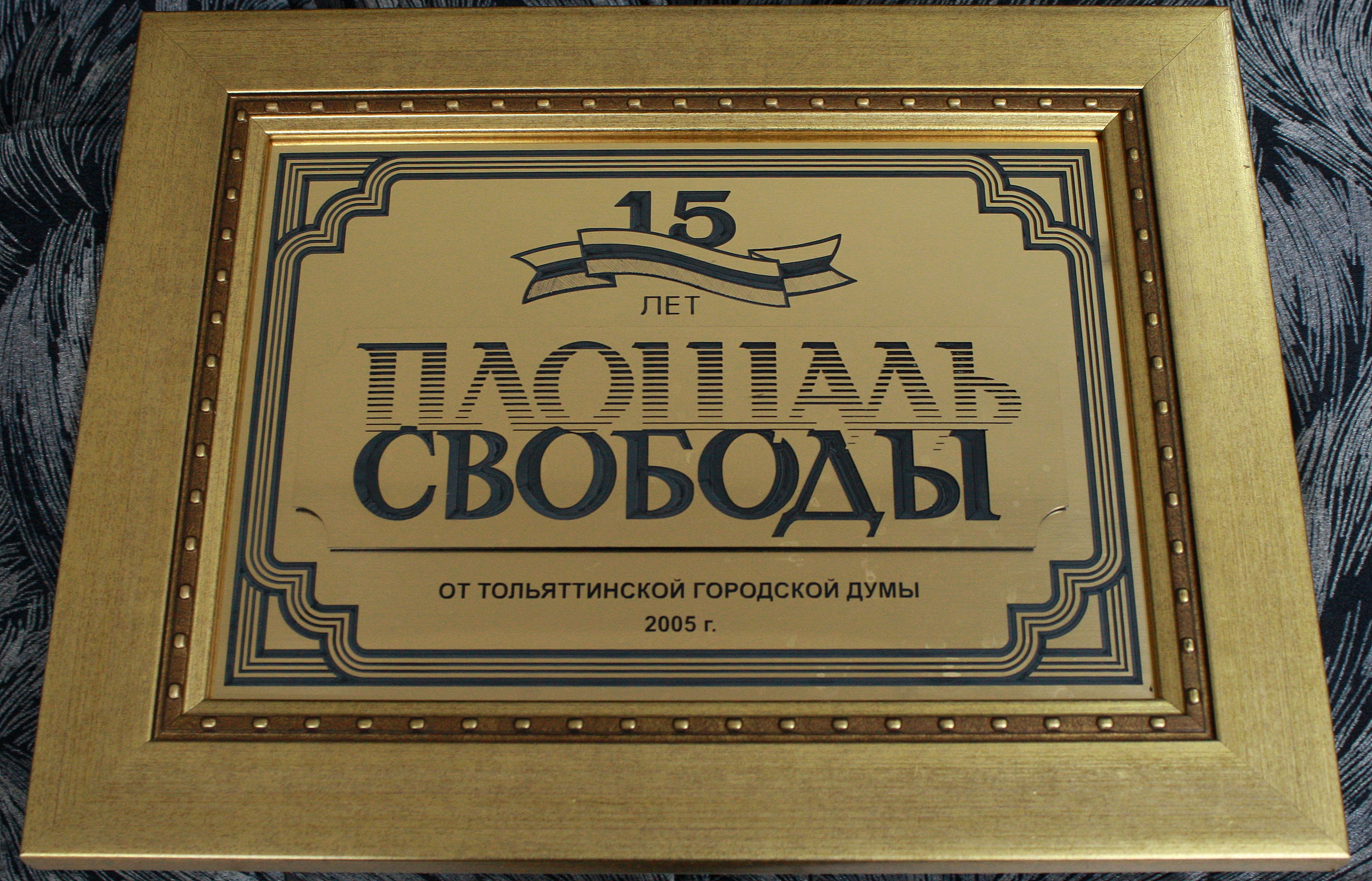 Благодарственная табличка газете "Площадь Свободы" от Тольяттинской Городской Думы на пятнадцатилетие издания.